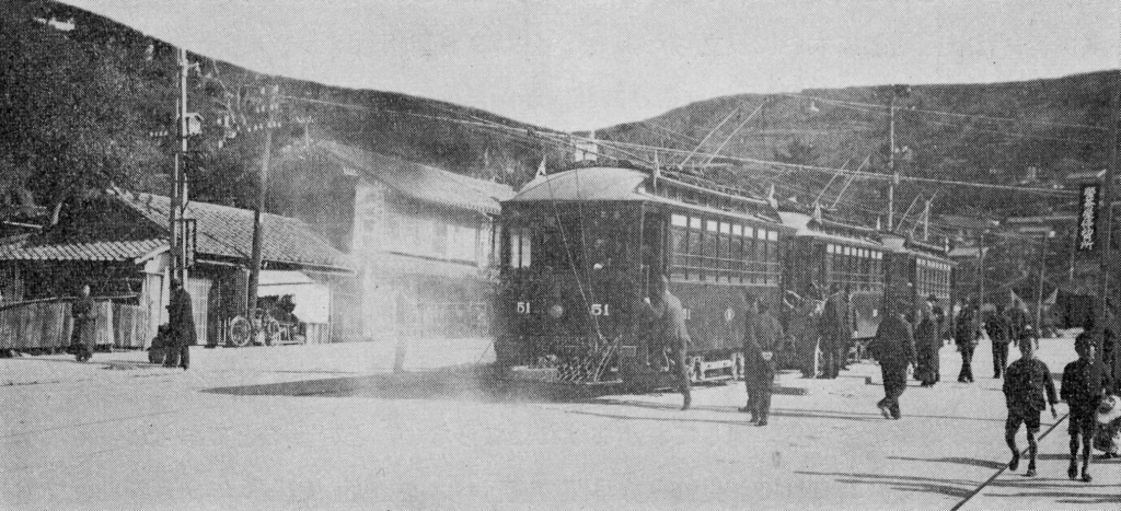 長崎電気軌道蛍茶屋停留所の開業日当日の様子。背景の山は軍の要望で修正されている。